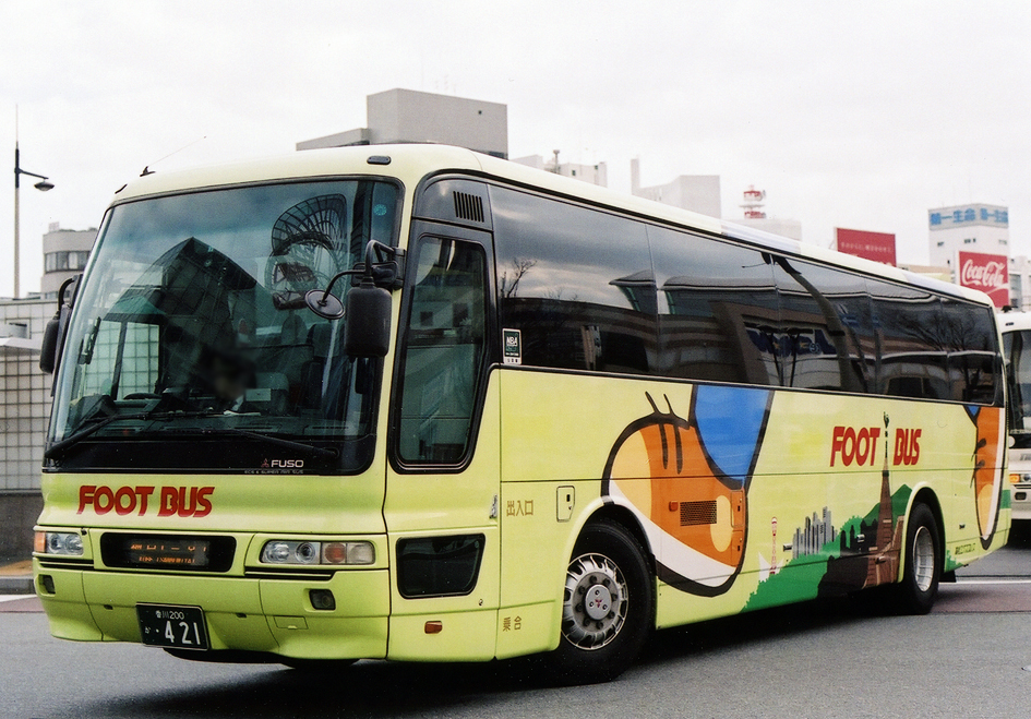 高松エクスプレス 神戸フットバス 元神戸フェリーバス KL-MS86MP